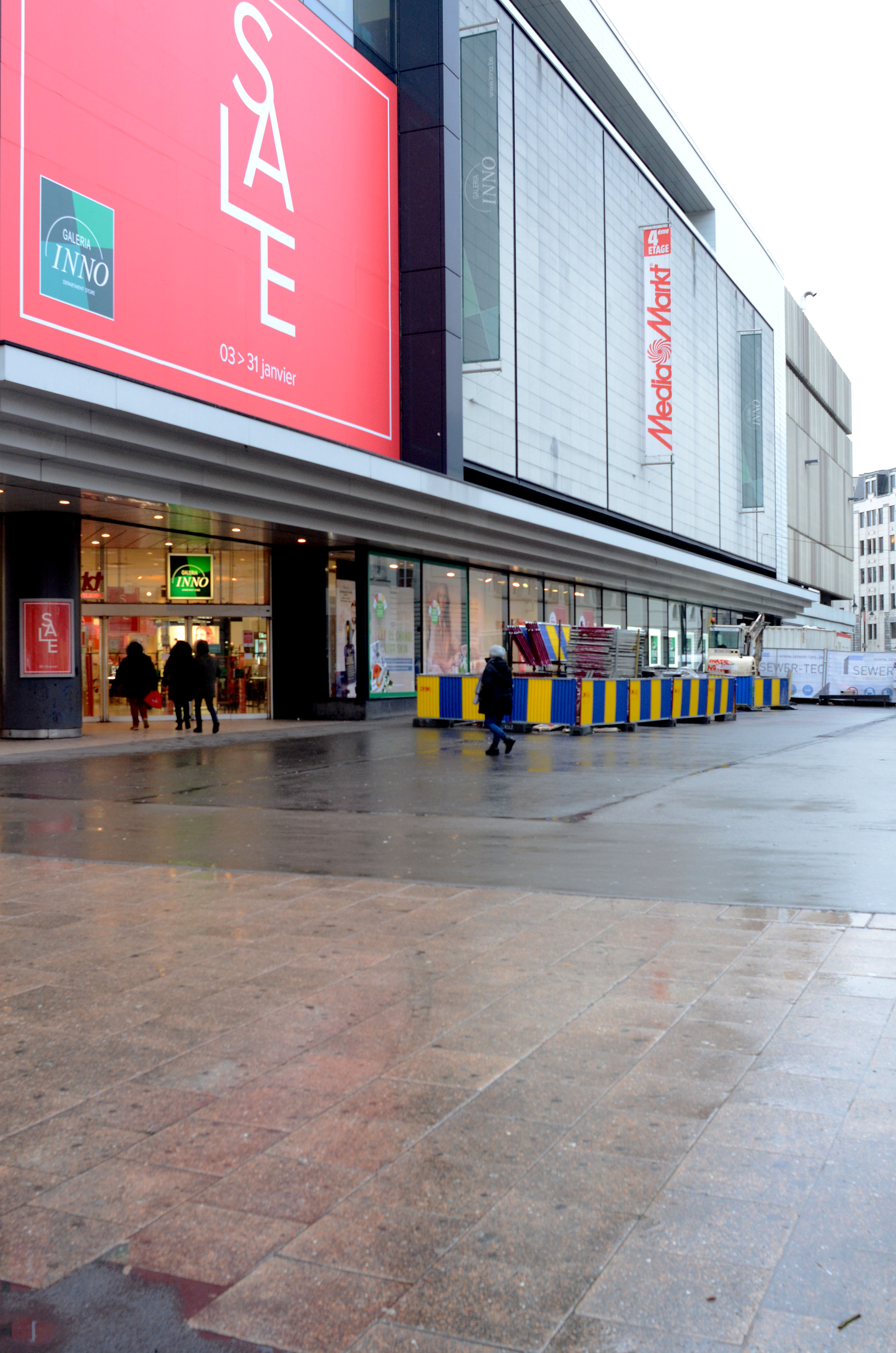 Photographie du magasin Innovation à Bruxelles, construit par les architectes A. et J. Polak